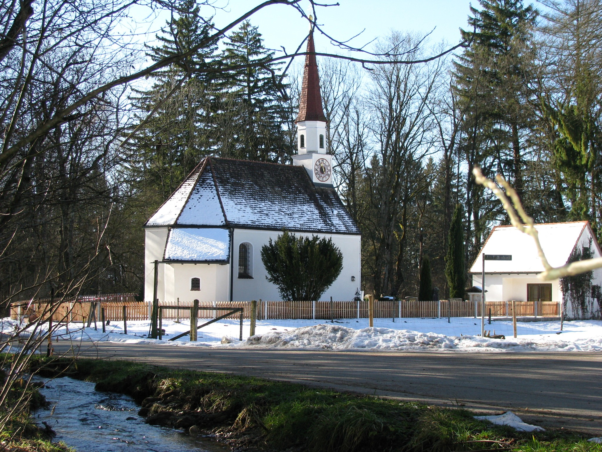 Filialkirche St. Georg in Puppling, Gemeinde Egling